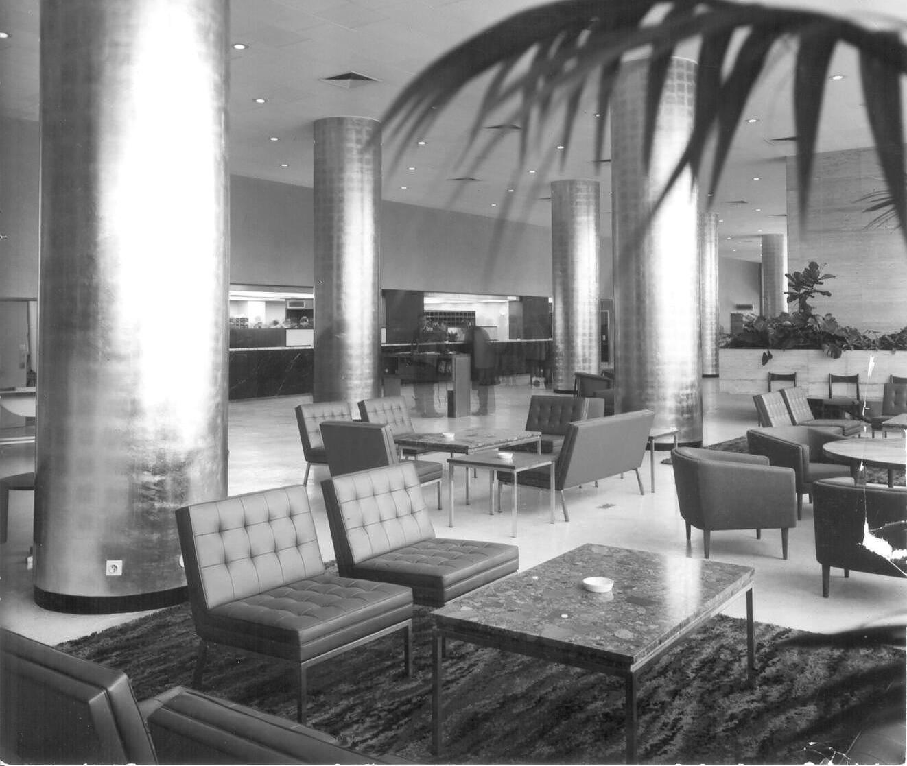 Lobby des InterContinental Wiens 1964